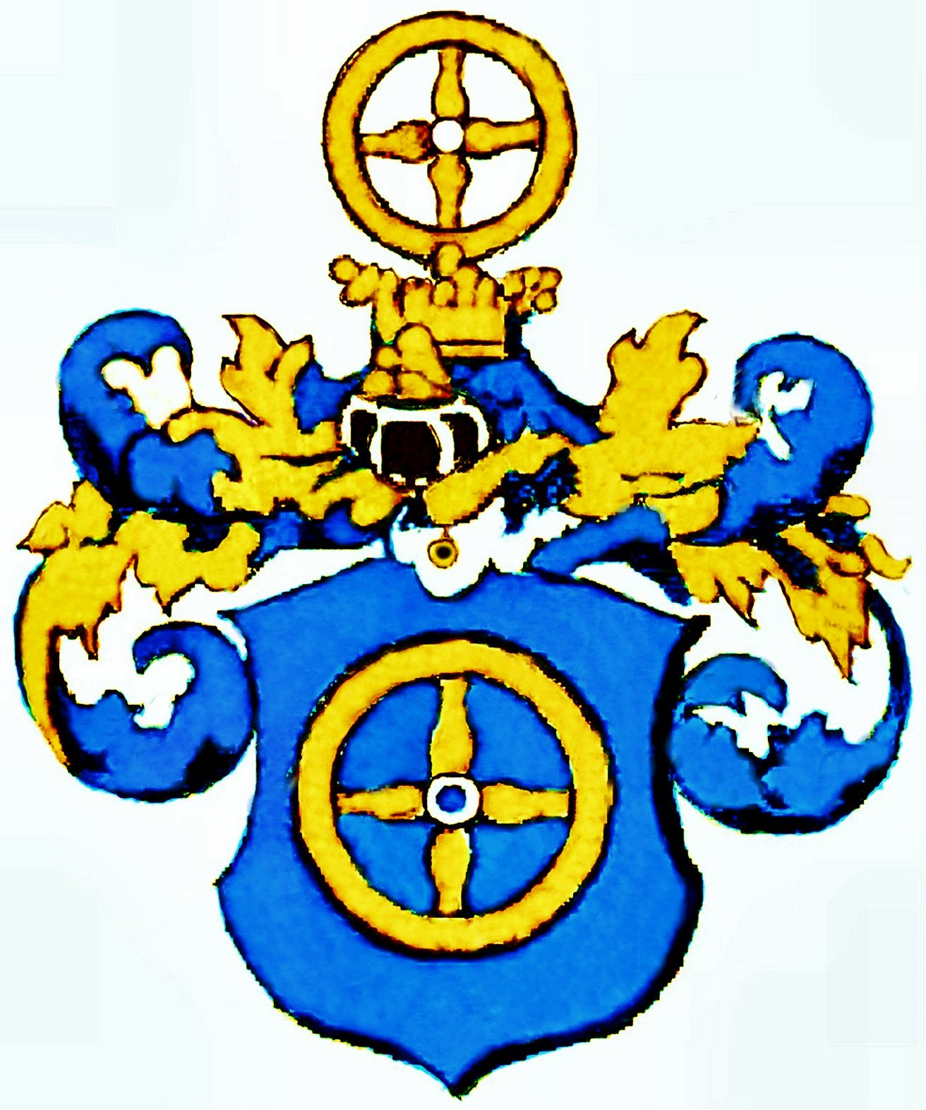 Wappen Kotz von Dobrz I, koloriert